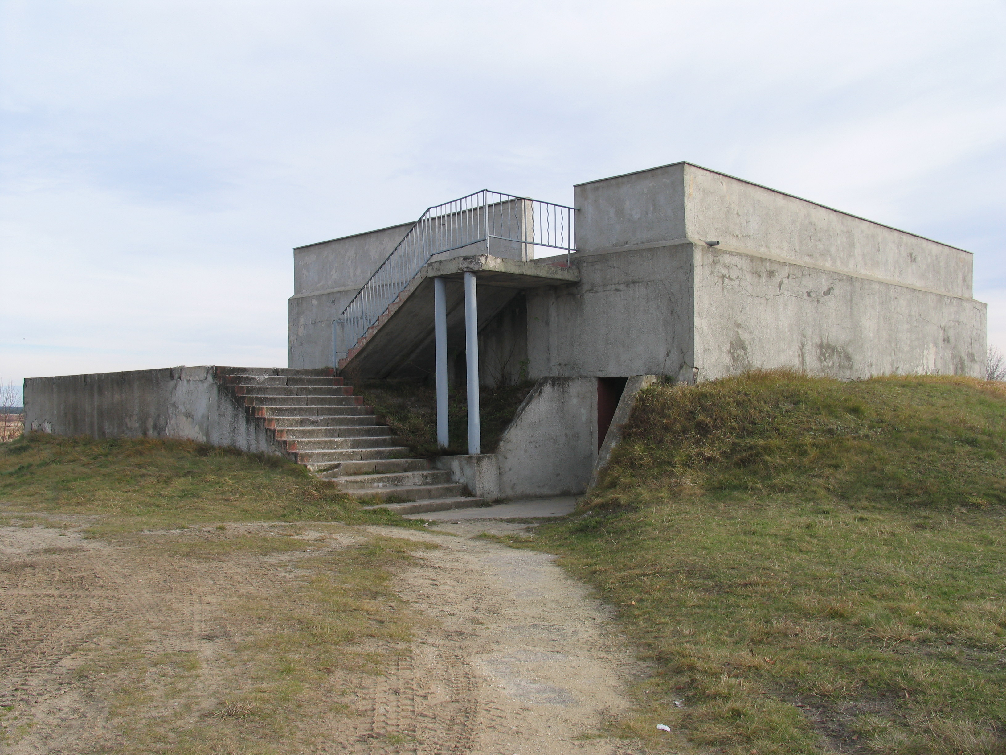 Poniemiecki bunkier obserwacyjny na poligonie Bory Dolnośląskie